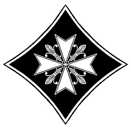 bREAST CROSS OF A kNIGHT OF oBEDIENCE IN THE oRDER OF mALTA MY OWN DRAWING Robert Prummel Groningen